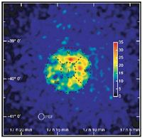 Triangolazione